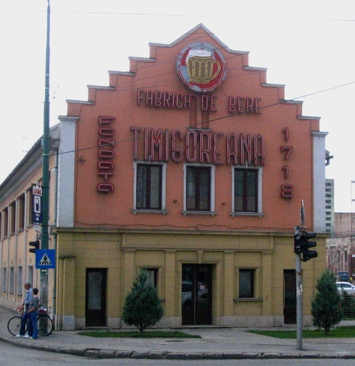 Fabrica de bere, Timisoara, Romania